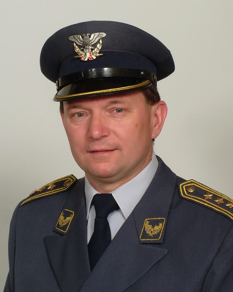 Пуковник Золтан Дани, као командант 3. рактеног дивизиона РВ и ПВО